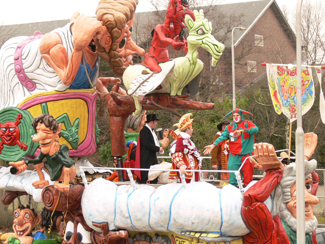 Eigen foto.Strienenaer 13 mrt 2007 19:06 (CET)